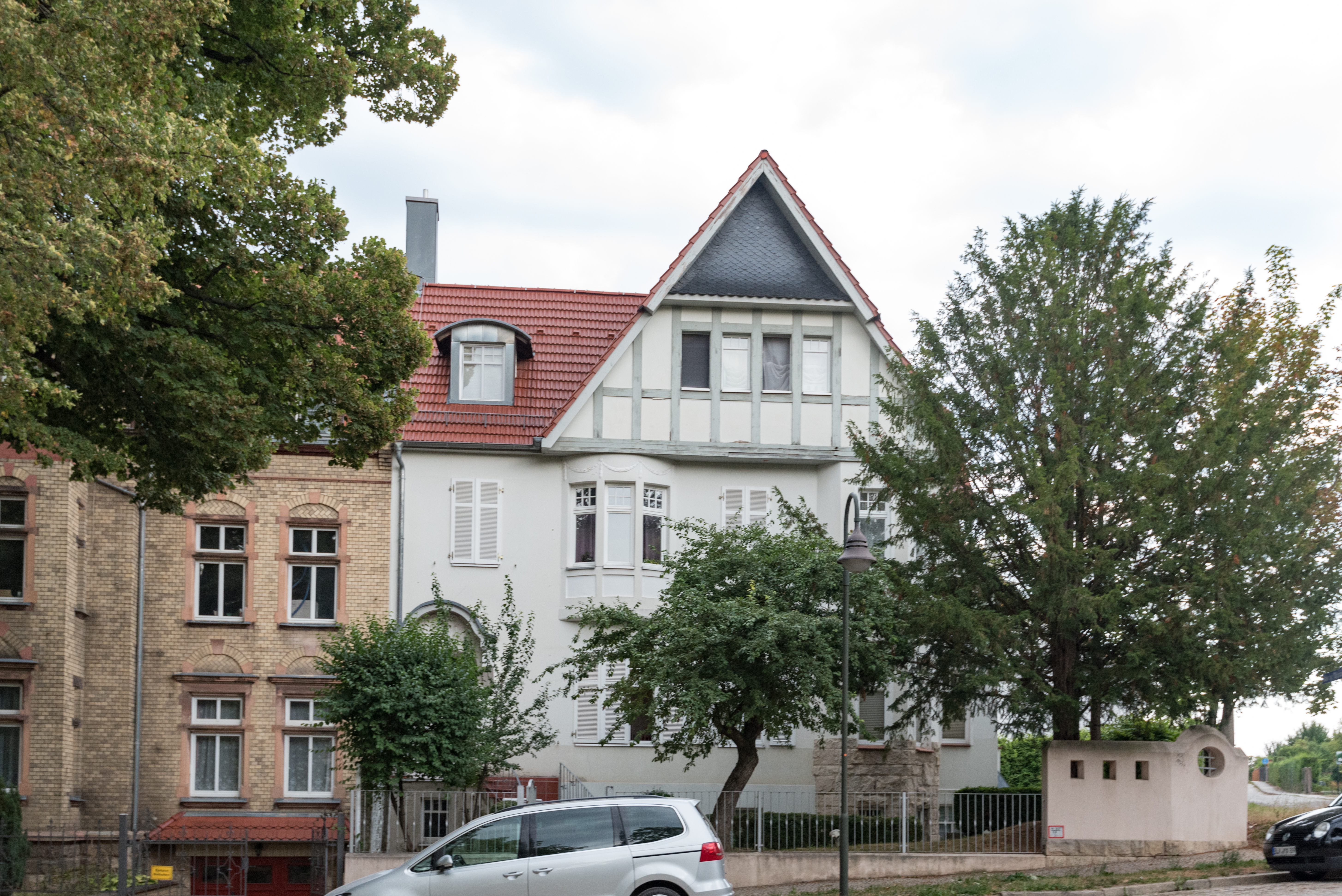 Naumburg (Saale), Kirschberg 8